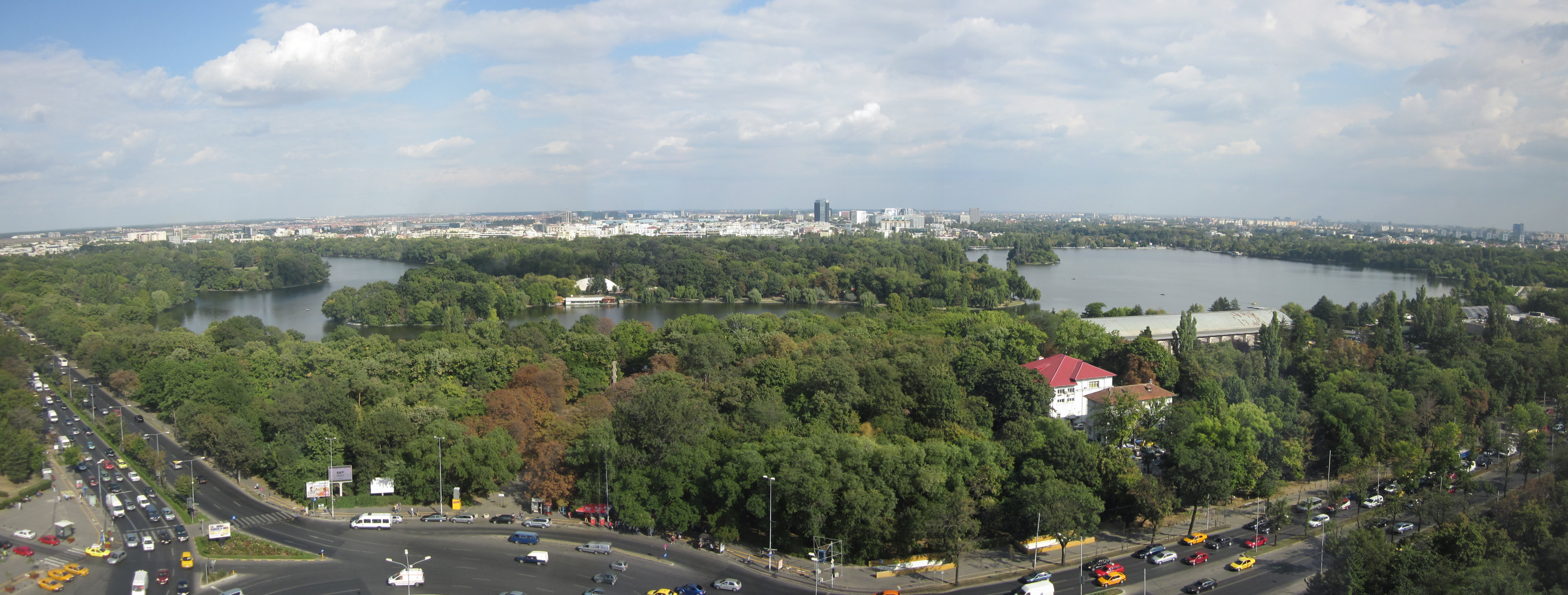 Parcul Herastrau vedere panoramica.